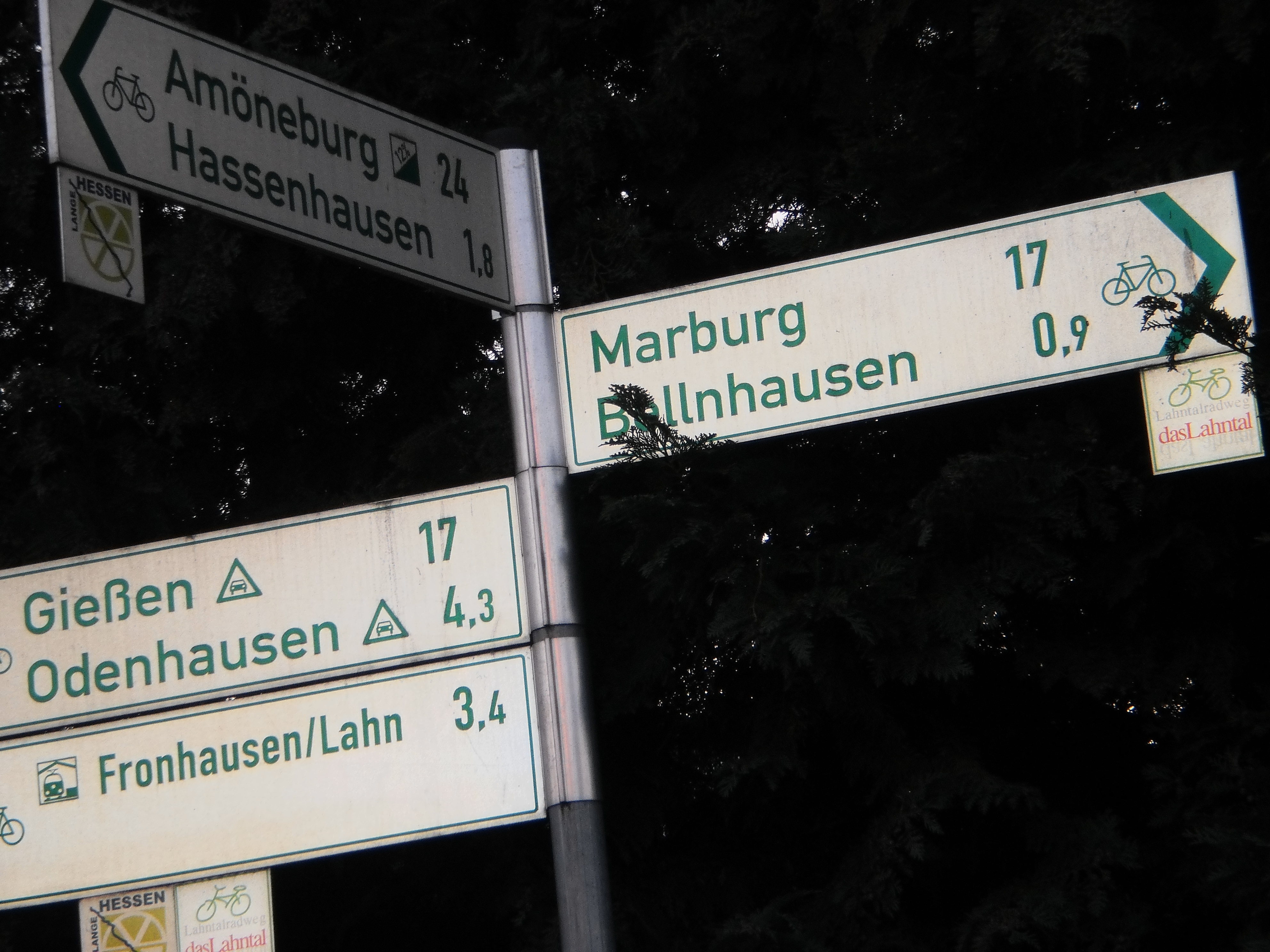 Radverkehrswegweiser, fast direkt am Dorfgemeinschaftshaus (DGH) in Sichertshausen (Fronhausen), welches sich links vom Standort befindet: Hier zweigt die Radroute "Lange Hessen" in Richtung Hassenhausen und weiter nach Amöneburg (24 km) vom Lahntal-Radweg ab.Der Wegweiser nach links zeigt flussabwärts in Richtung Giessen (17 km), nach rechts (Norden) zum Ortsteil Bellnhausen und weiter nach Marburg (17 km). Dort vor dem DGH-Gebäude weist eine Informationstafel mit Übersichtsplan zum Streckenverlauf des Lahntalradwegs und der auch innerörtlich genutzten Radroute "Lange Hessen" auch auf die Renaturierung der Lahnaue hin.